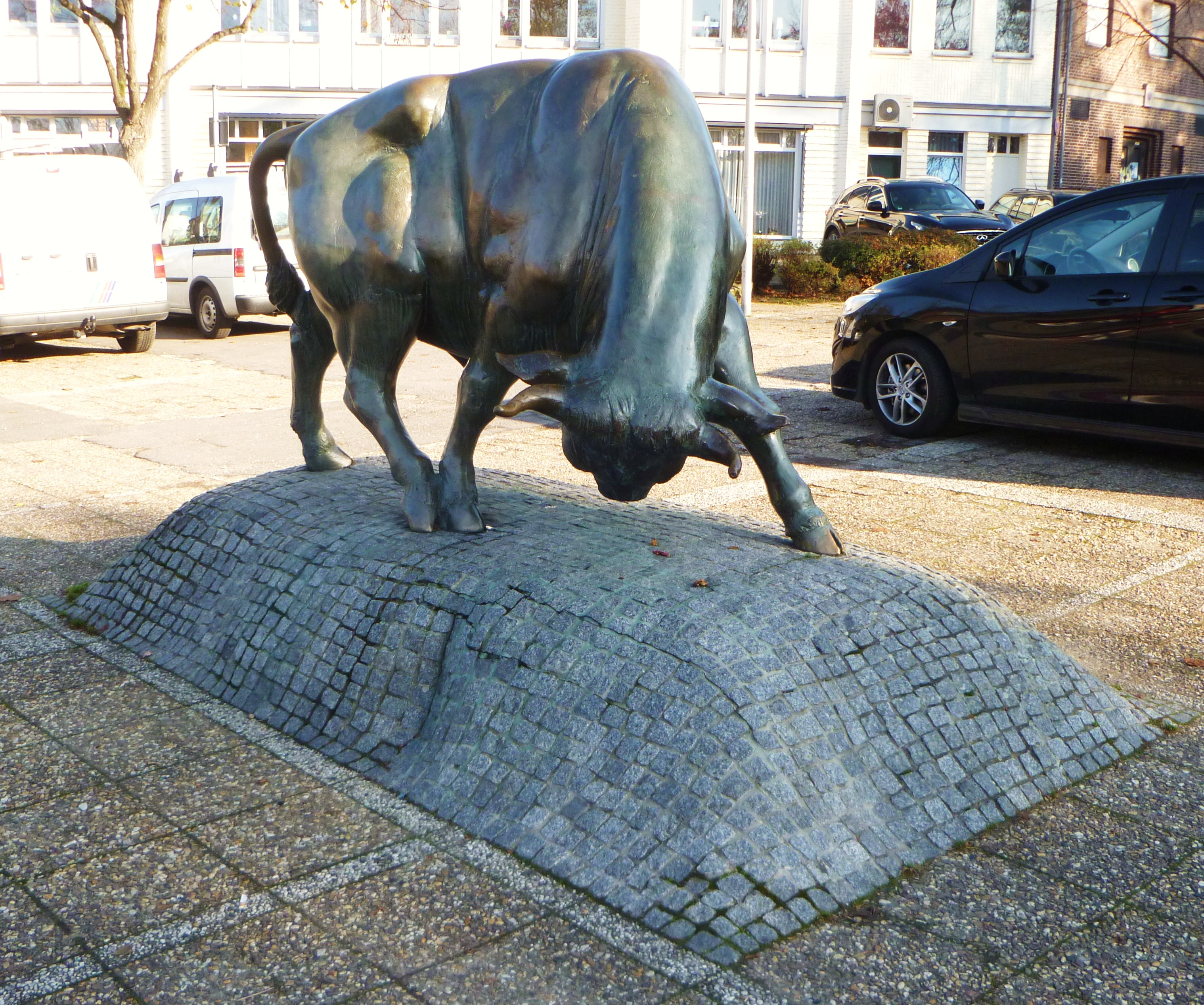 Skulptur in Aachen-Brand, Marktpaltz Brand, Karl Henning Seemann, 1976